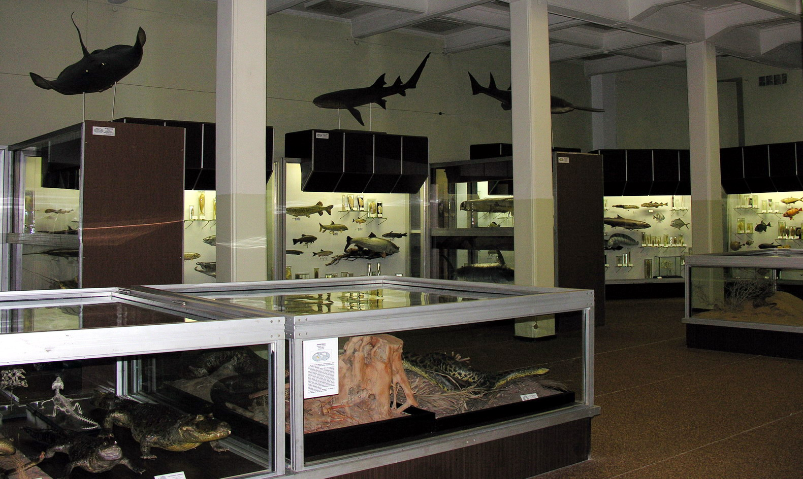 Kauno Tado Ivanausko zoologijos muziejus, 2006 m. gruodžio 2 d.